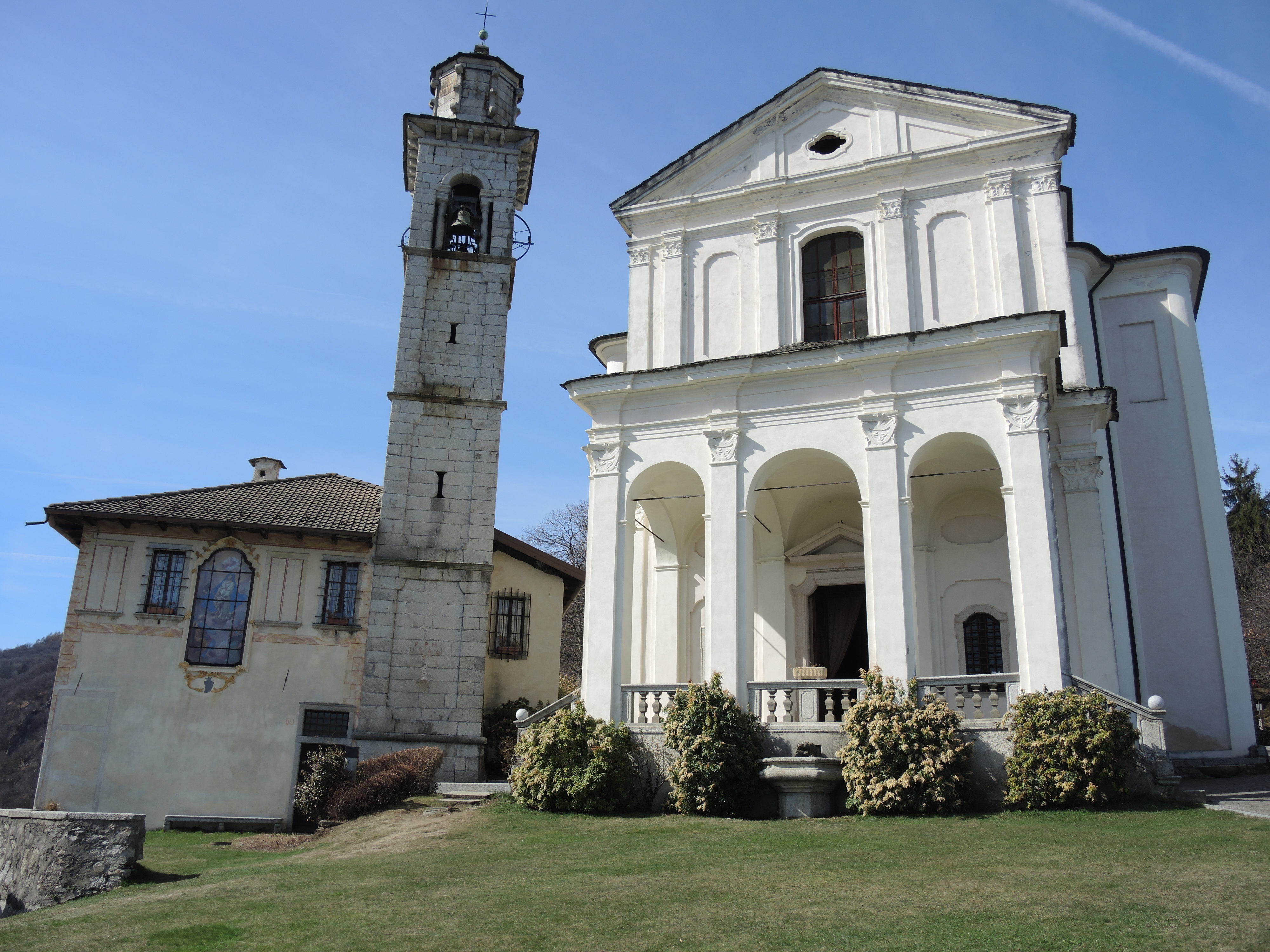 Boleto: Santuario della Madonna del Sasso